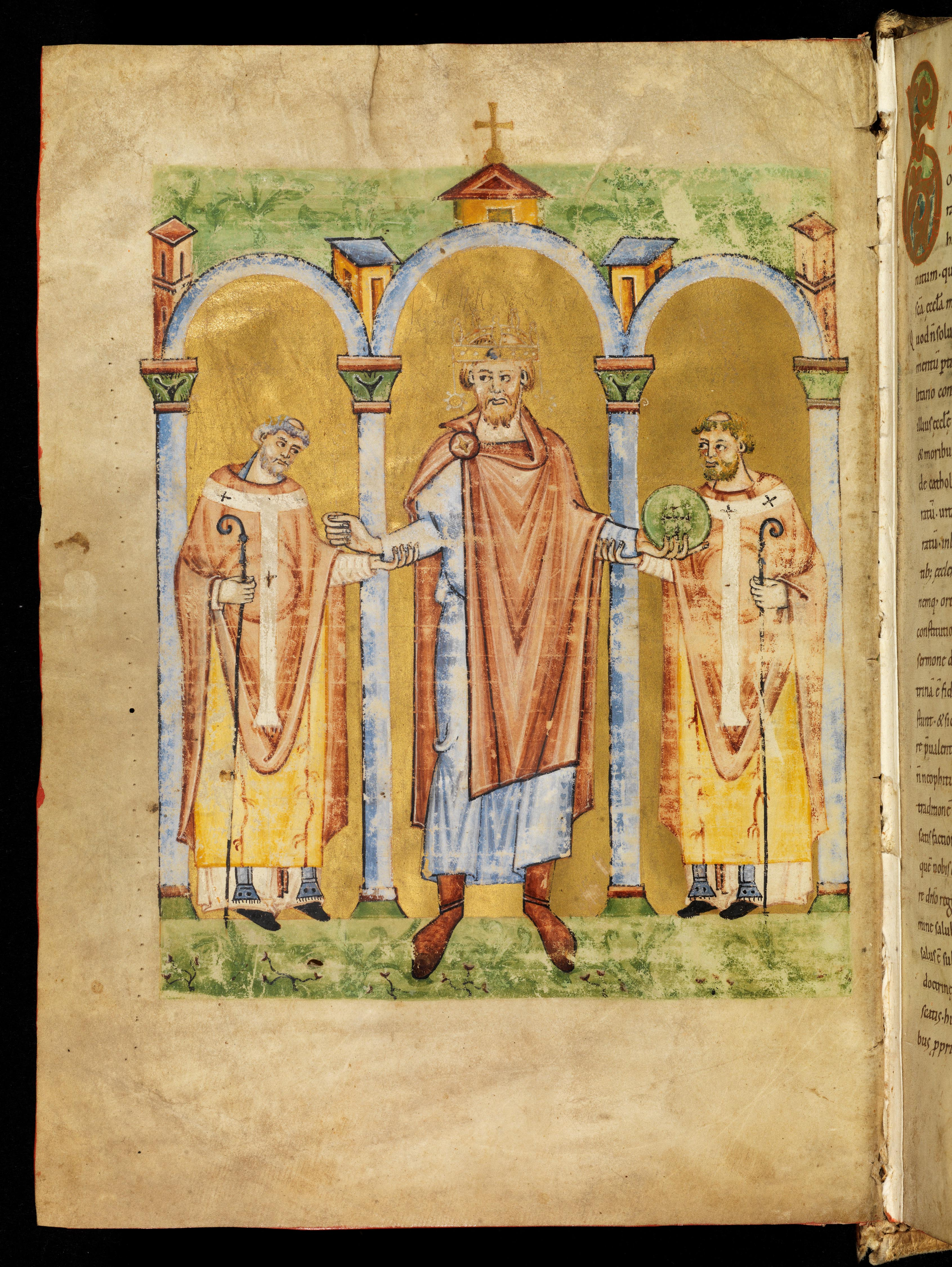 Heinrich II. zwischen zwei Bischöfen im Seeoner Pontifikale. Bamberg, Staatsbibliothek, lit 53, fol. 2v